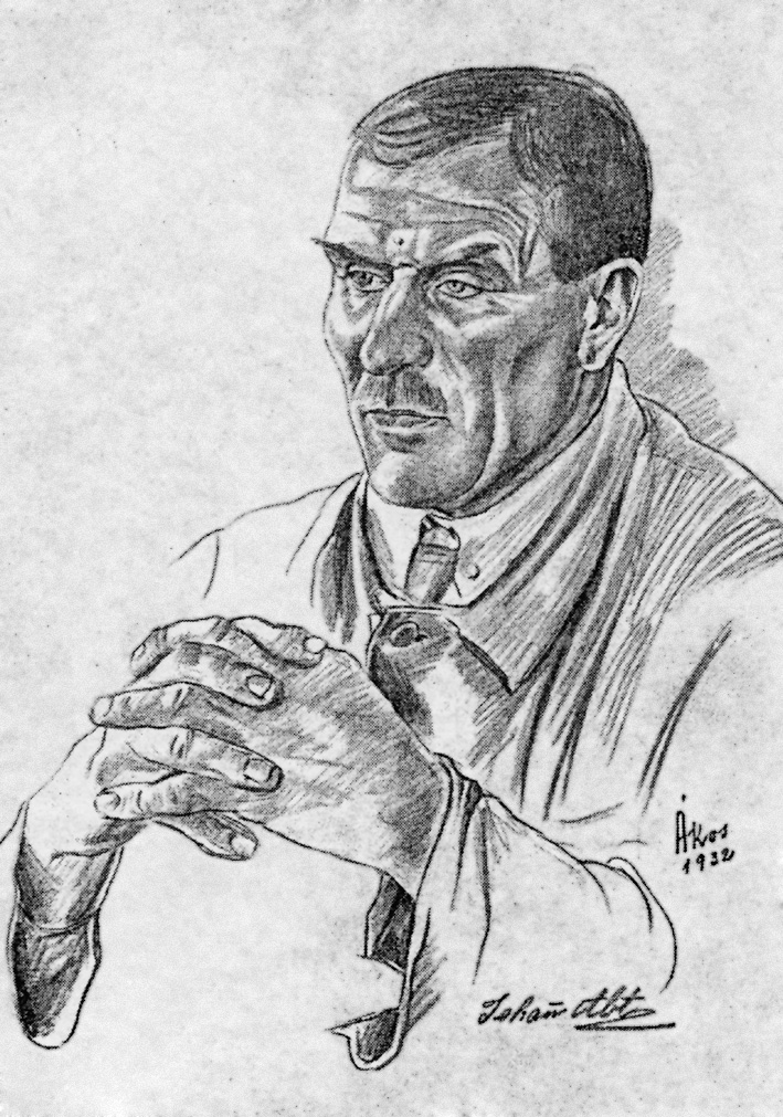 Abt-Firmengründer Johann Abt (Zeichnung aus dem Jahr 1932)